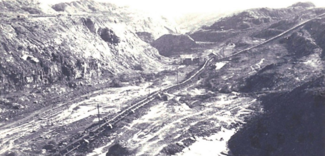 Batu Arang surface coal mine in 1949